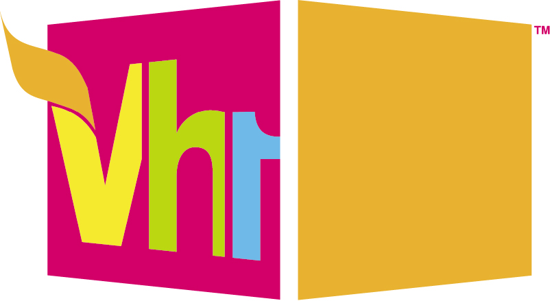 Antigo logo do canal Vh1 Brasil, utilizado até março de 2013.